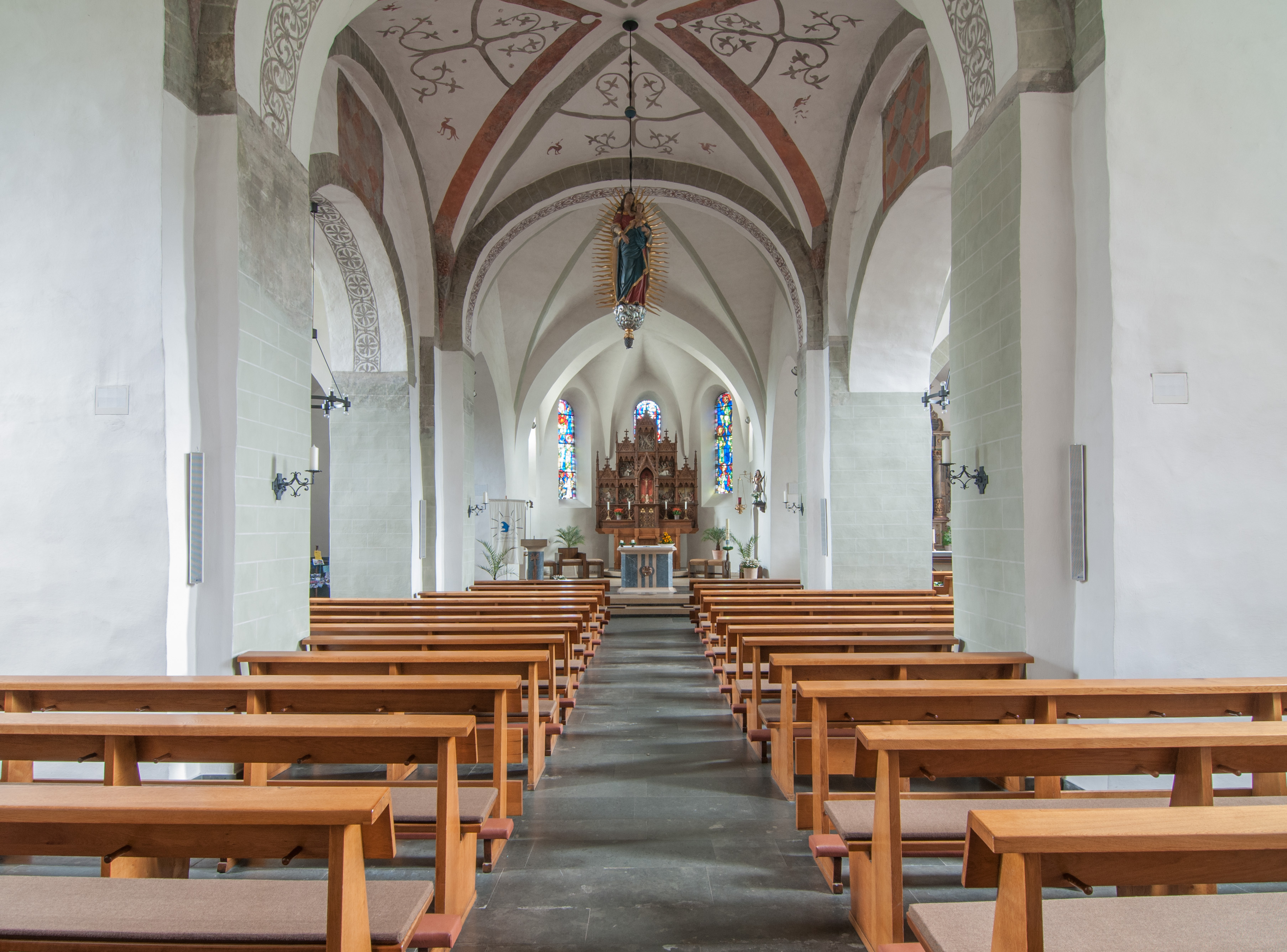 Stockum, St. Pankratius, Mittelschiff